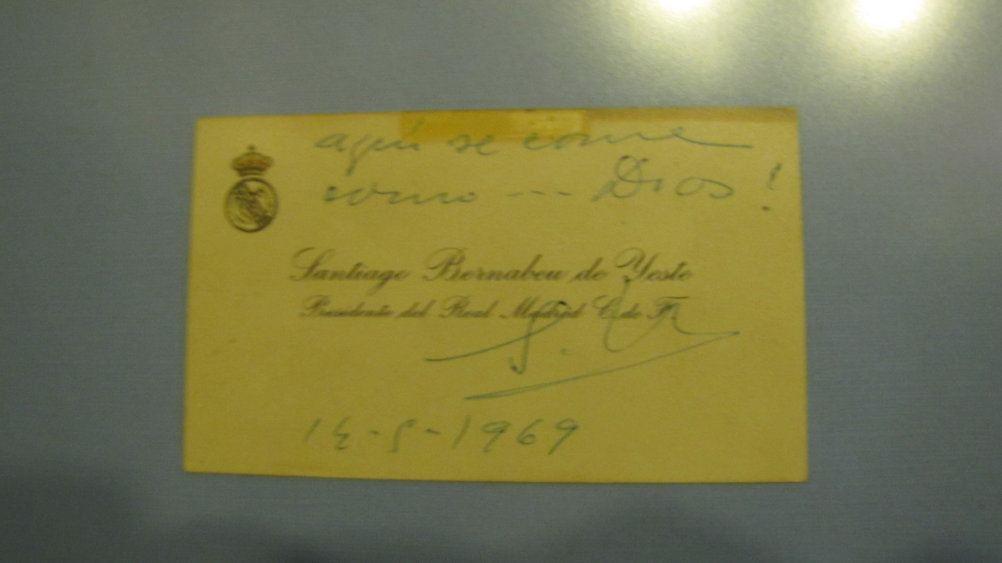 Fotografía de la tarjeta de presentación de D. Santiago Bernabéu de Yeste, Presidente del Real Madrid C. F., que se encuentra en las paredes del Asador Rafael Corrales, en Aranda de Duero, Burgos, España. La tarjeta está dedicada el 14 de mayo de 1969, con la frase: "aquí se come como... Dios !", y firmada.